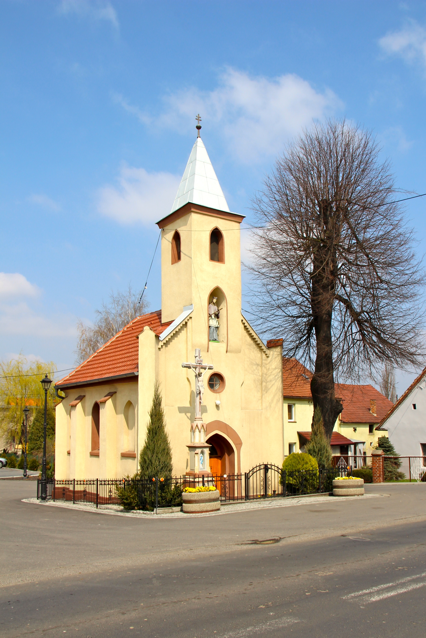 Reńska Wieś (dodatkowa nazwa w j. niem. Reinschdorf) – wieś w Polsce położona w województwie opolskim, w powiecie kędzierzyńsko-kozielskim, siedzibą gminy Reńska Wieś.